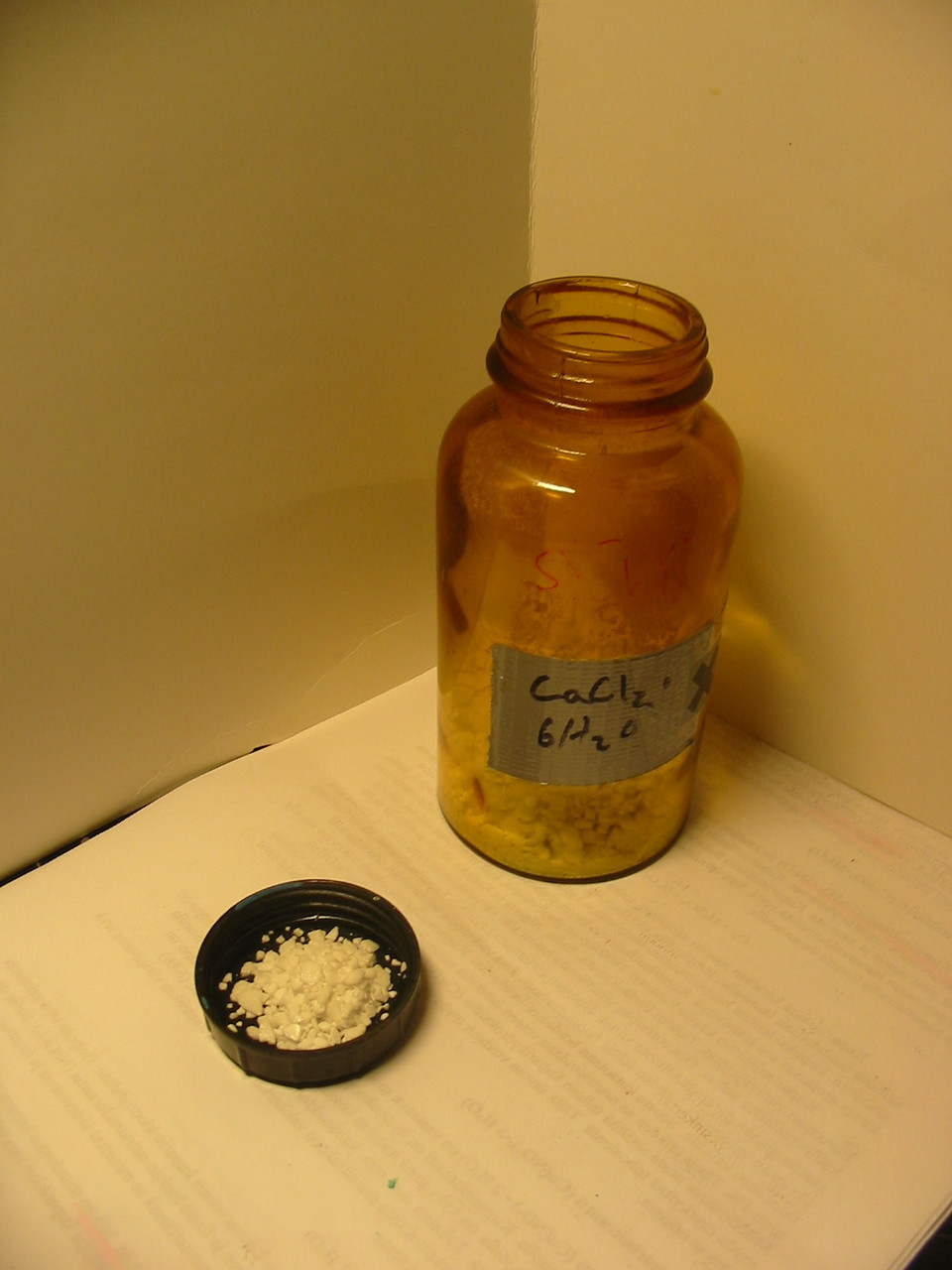 Kalsiumkloridia säilytysastiansa kannella